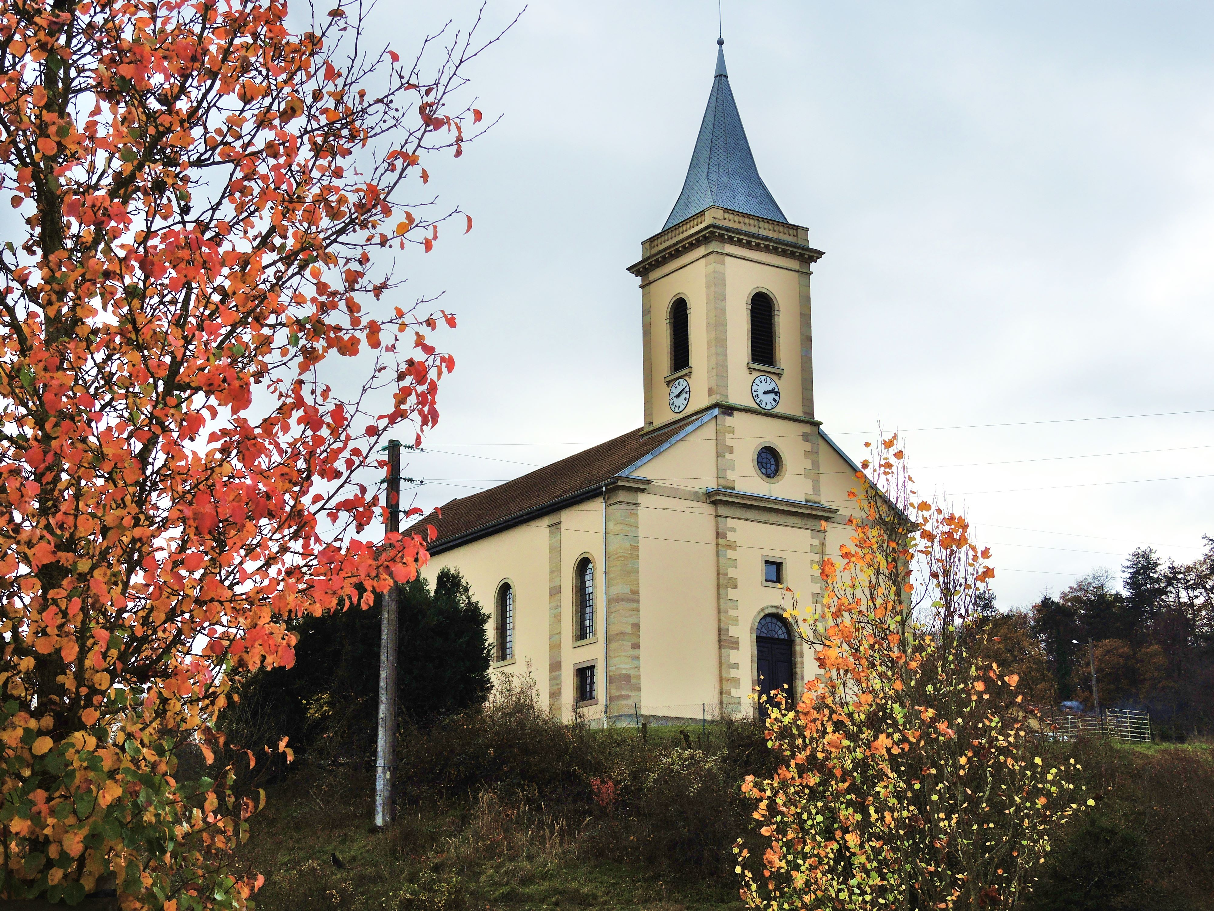 Temple du village d'Allondans. Doubs